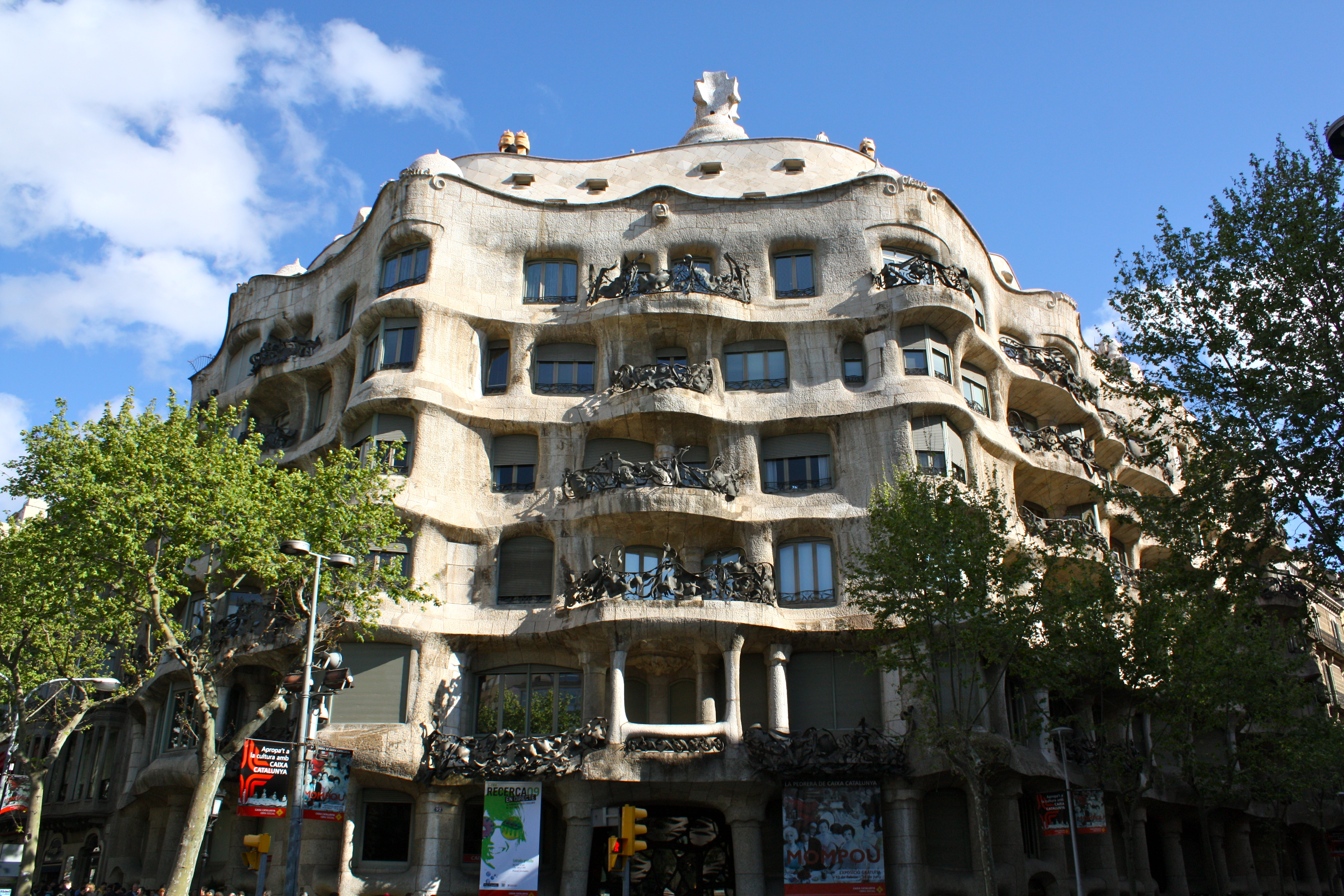 Barcelona Part Deux - 08